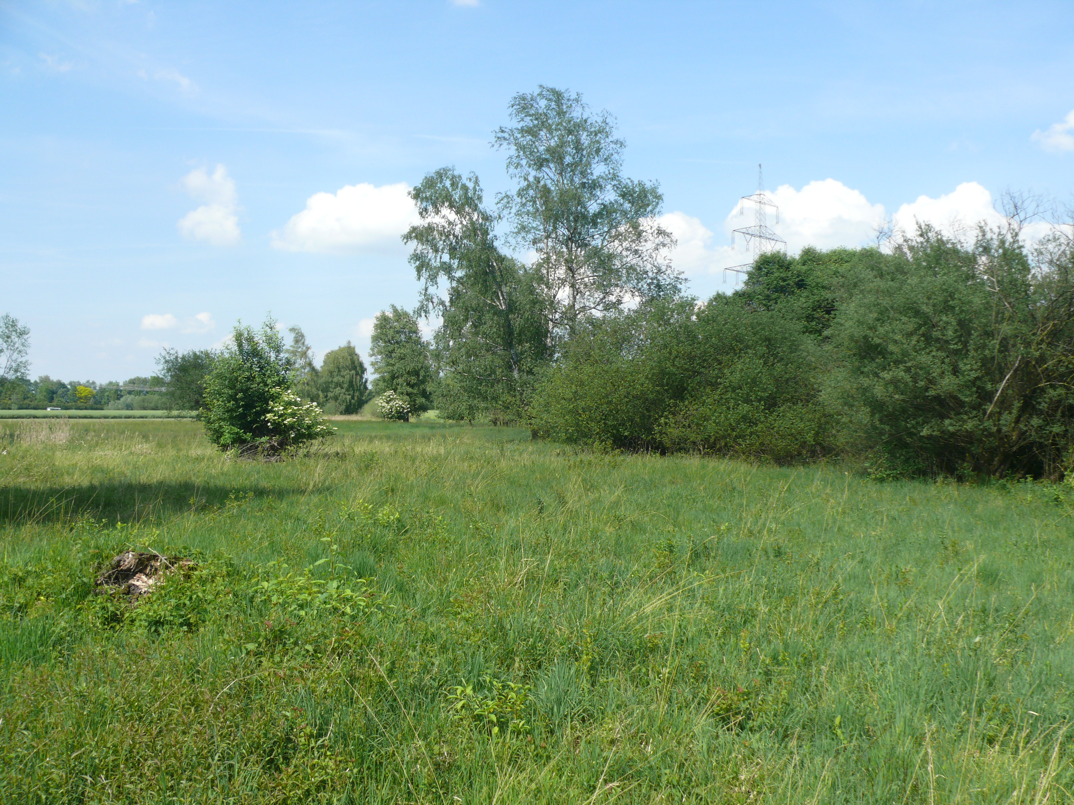 Naturschutzgebiet Gfällach, Landkreis Erding, Bayern